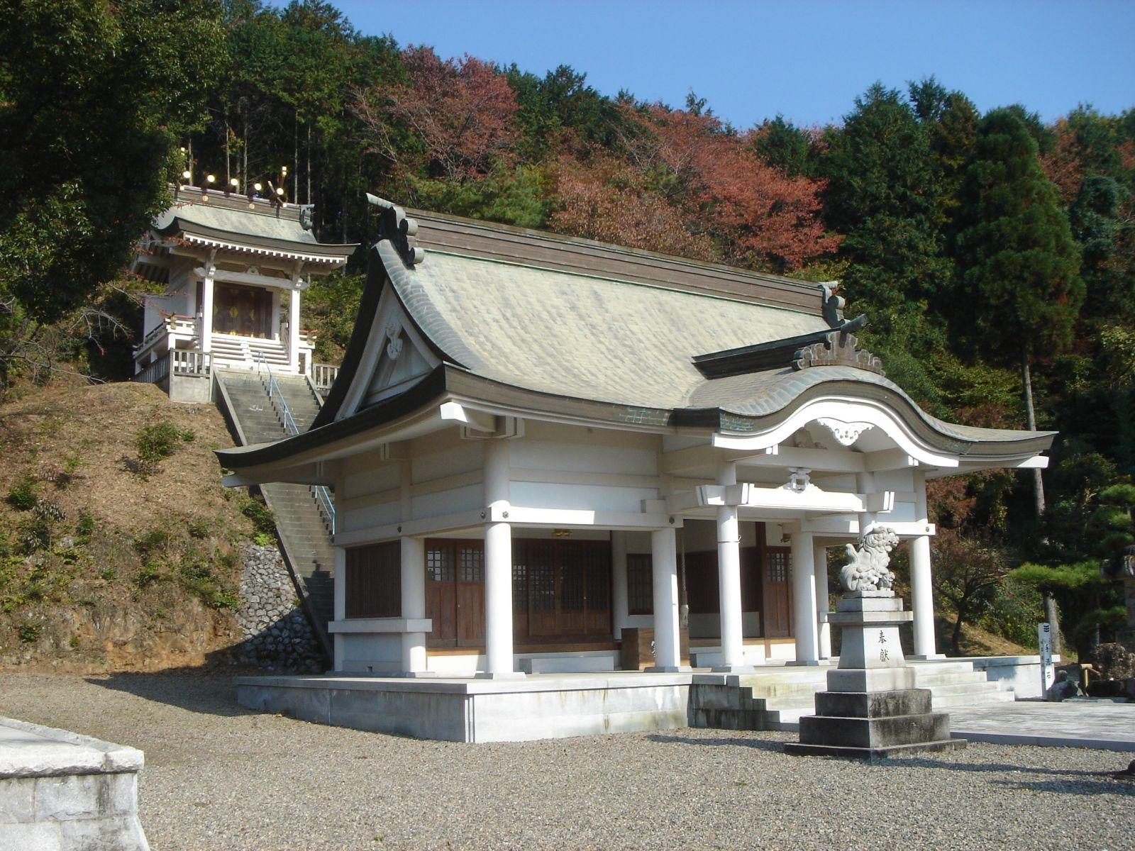 Kiburi Jinjya(Shrine)(来振神社),Ono,Gifu,Japan(岐阜県大野町)で撮影。